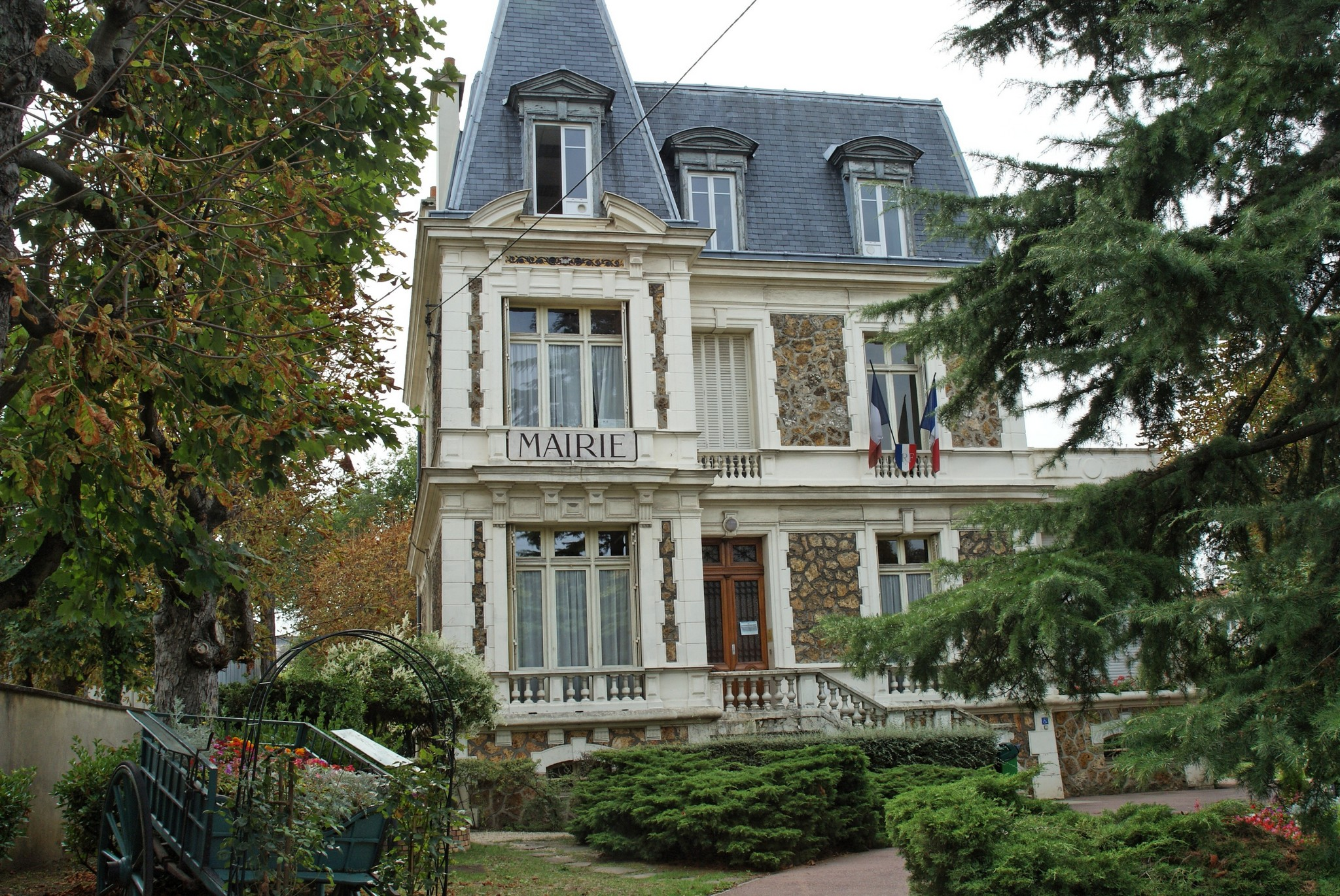 Mairie d'Ablon-sur-Seine, Val de Marne, France - Town hall of Ablon-sur-Seine, Val-de-Marne, France.